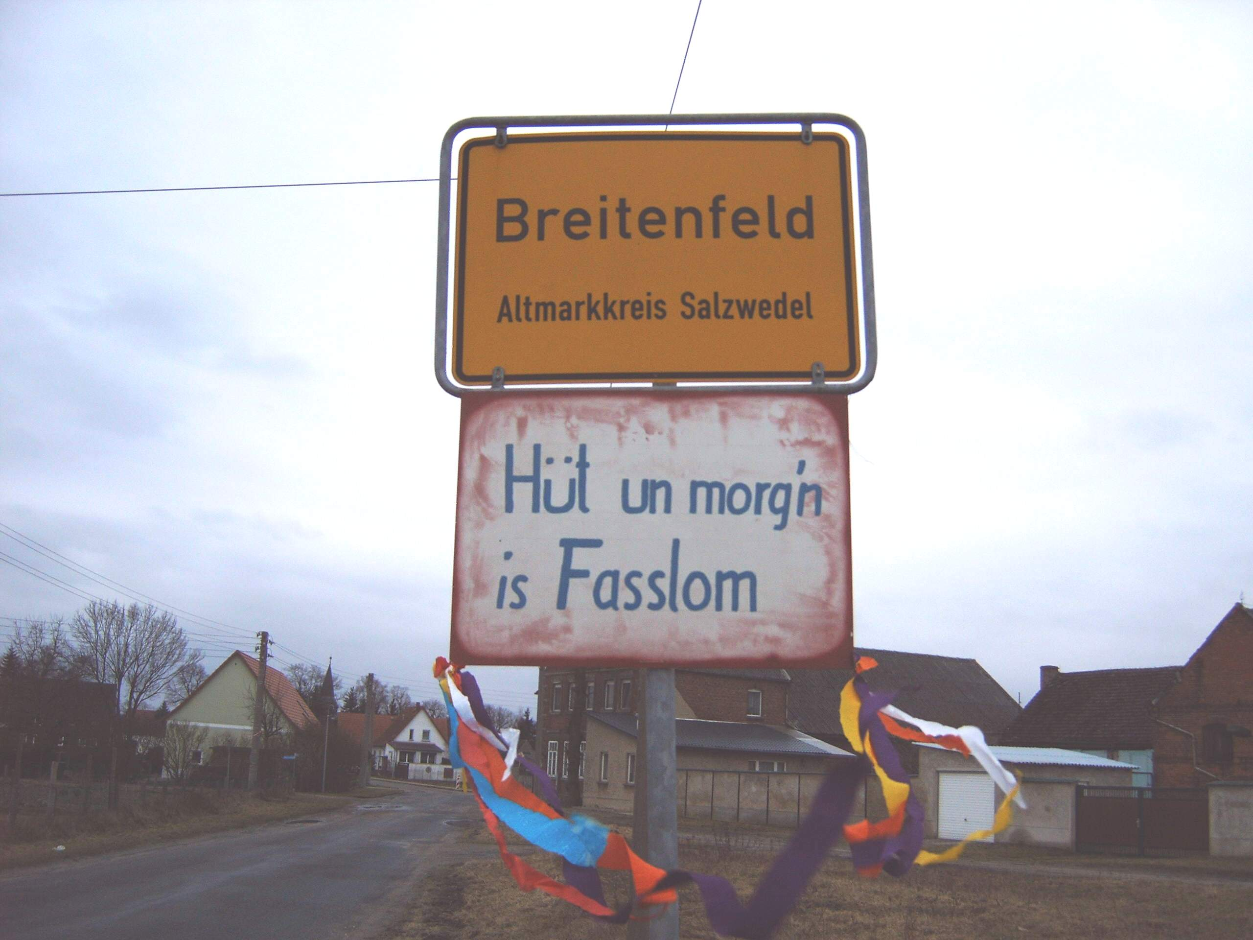 Ortseingangsschild des Dorfes Breitenfeld (Altmark), Deutschland, Sachsen-Anhalt, mit dem Hinweis auf das Faslomfest Bild aufgenommen am: 18.2.2006 Urheber: Olaf Meister